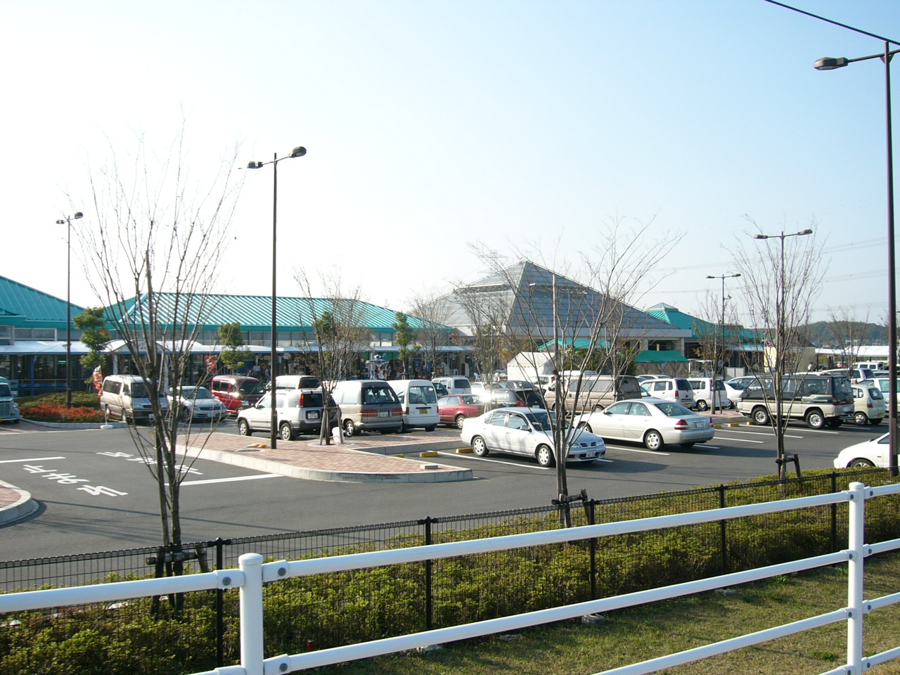 Michinoeki Itako (Ibaraki) (道の駅いたこ)